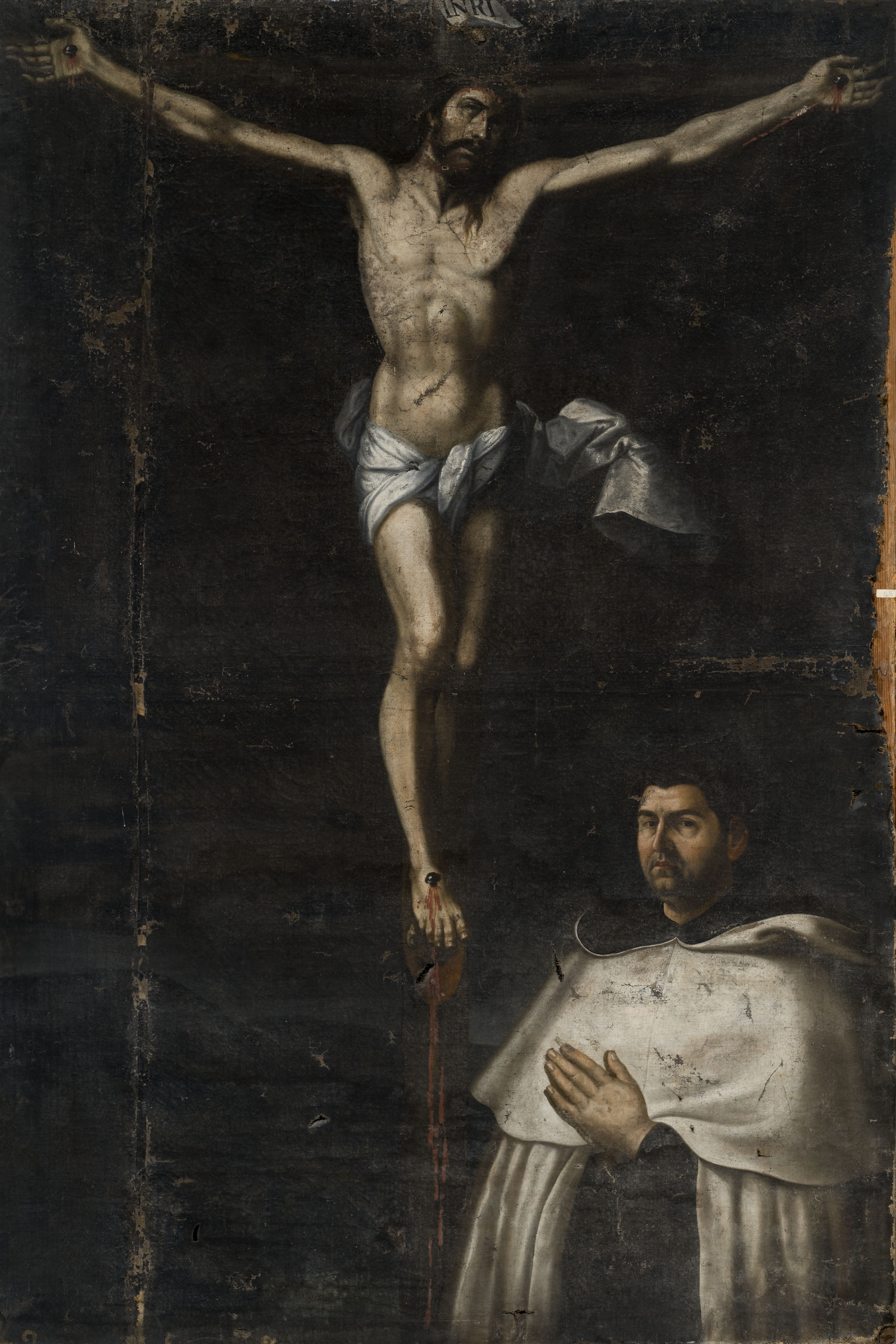 La obra muestra a Cristo crucificado junto a un fraile carmelita que podría ser San Juan de la Cruz.